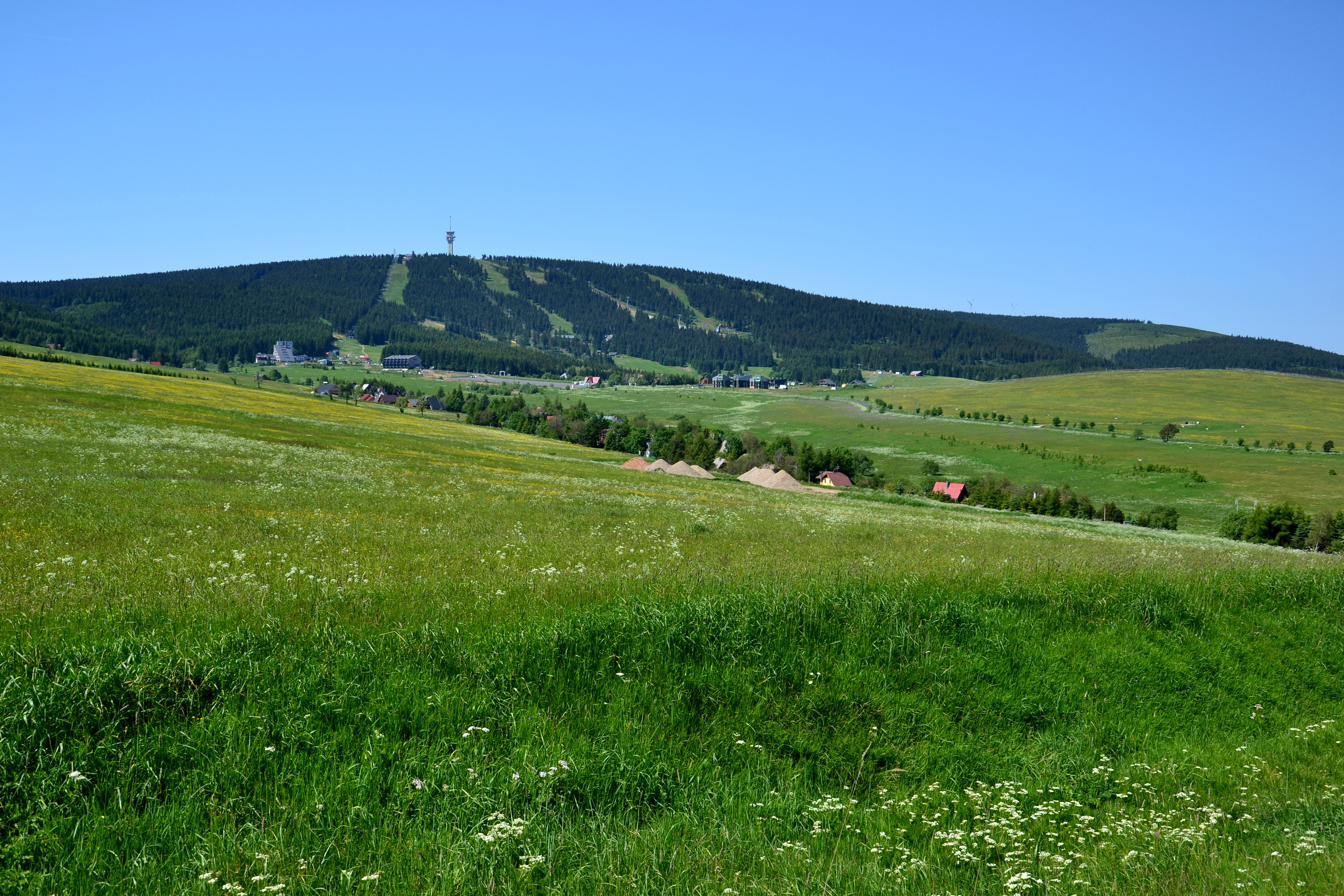 Pohled z návrší nad Hájem